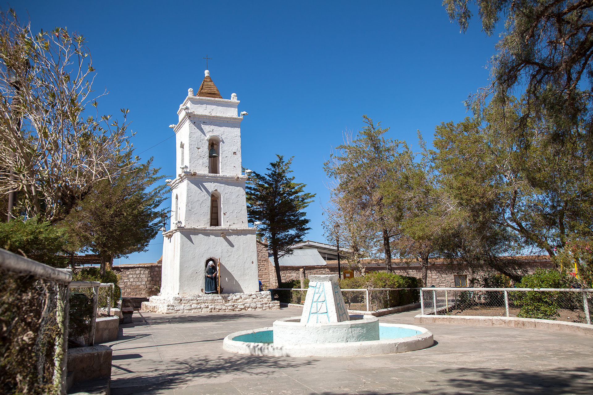 Campanario de Toconao This is a photo of a national monument in Chile: 303